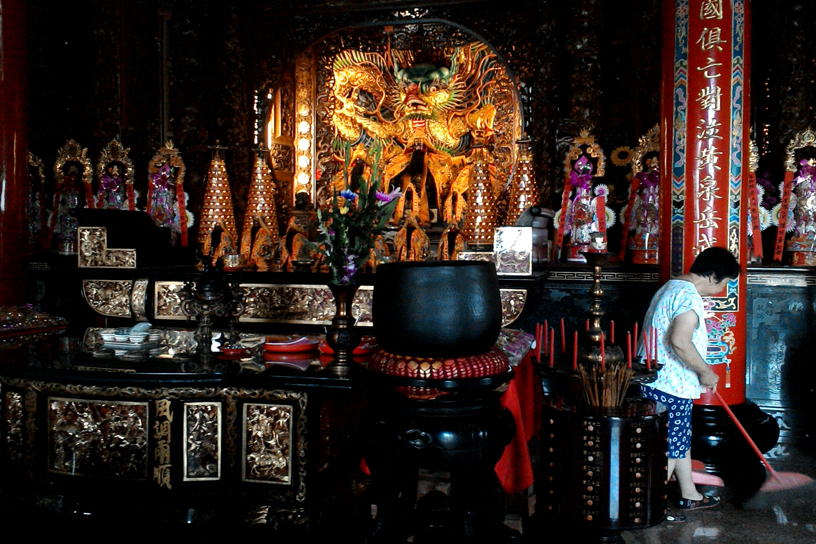 雙溪三忠廟內的文天祥、陸秀夫、張世傑像,新北市雙溪區雙溪里